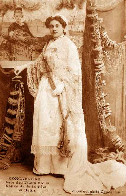 Mélanie Cabellic Reine des Filets Bleus 1912 à Concarneau.